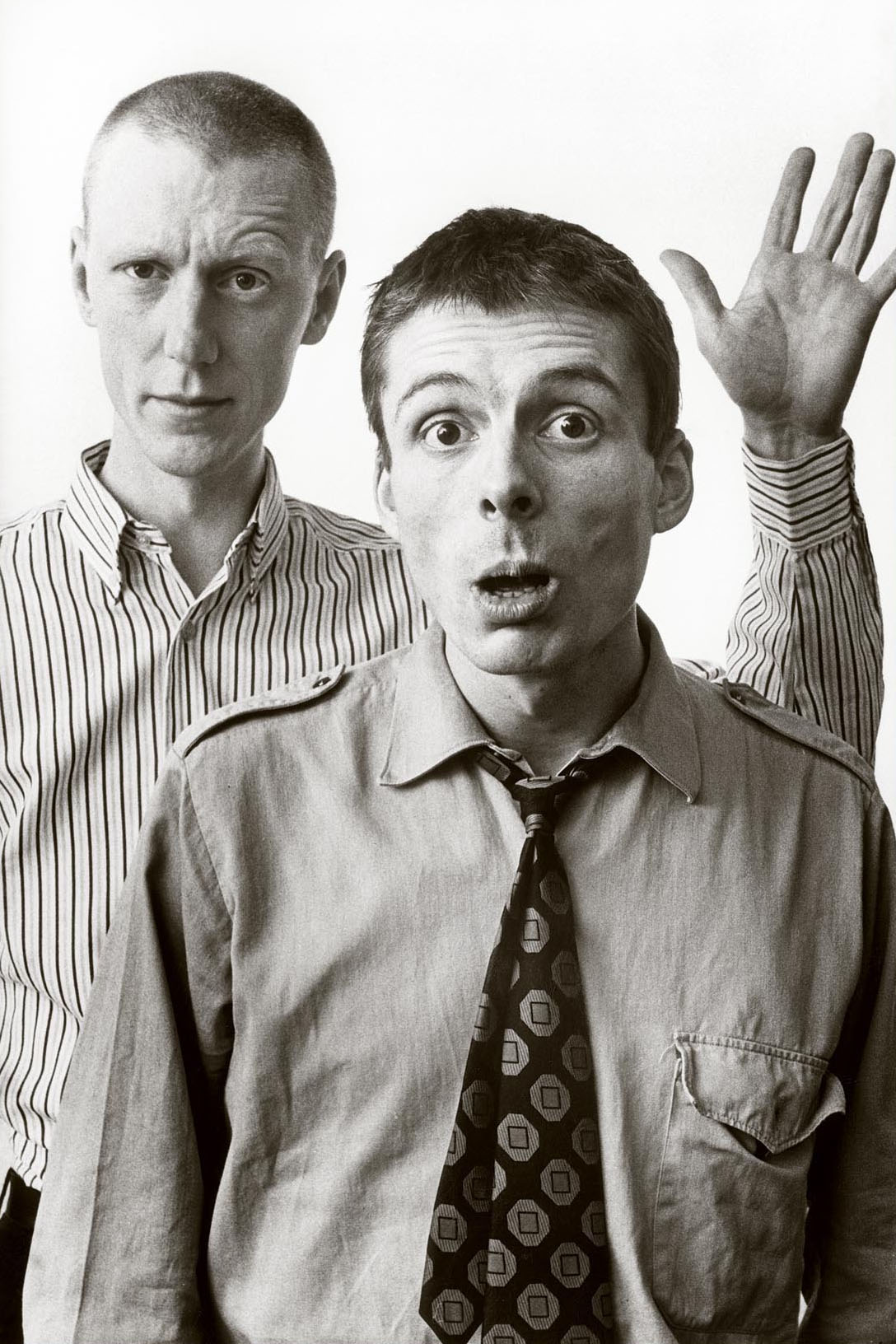 Kamagurka (vooraan) en Herr Seele.